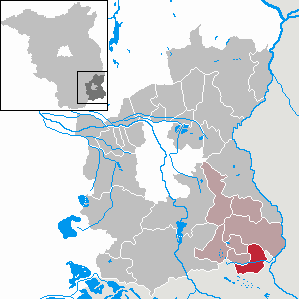 Jämlitz-Klein Düben in Brandenburg (Country) - District Spree-Neiße